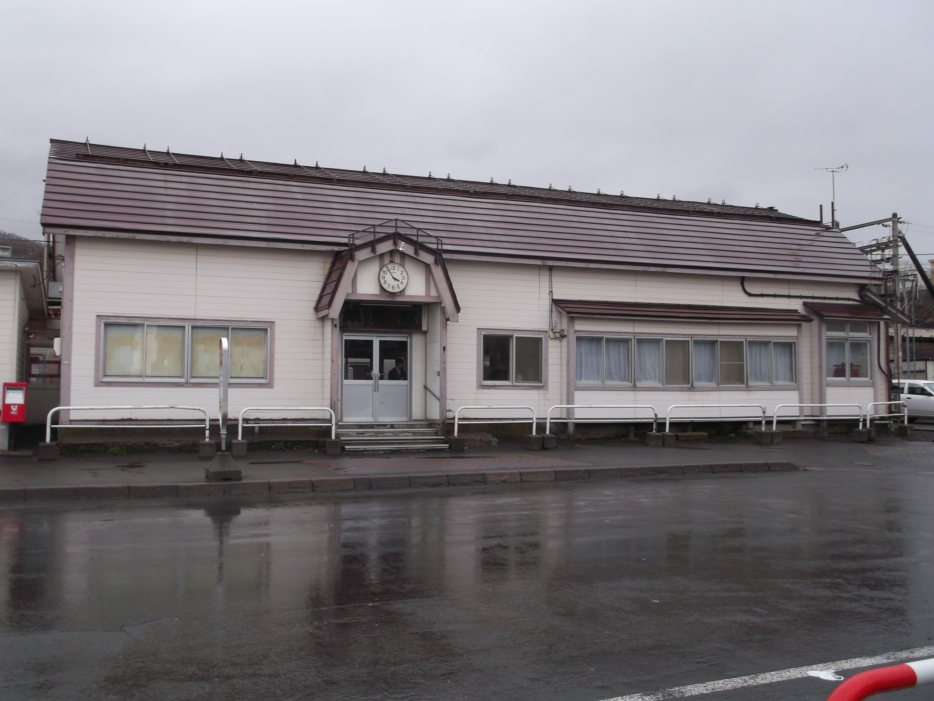 JR北海道銭函駅 駅舎